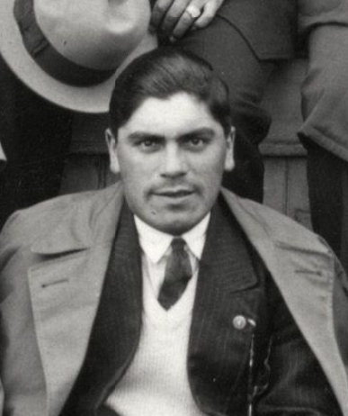 Víctor Morales Salas in 1928